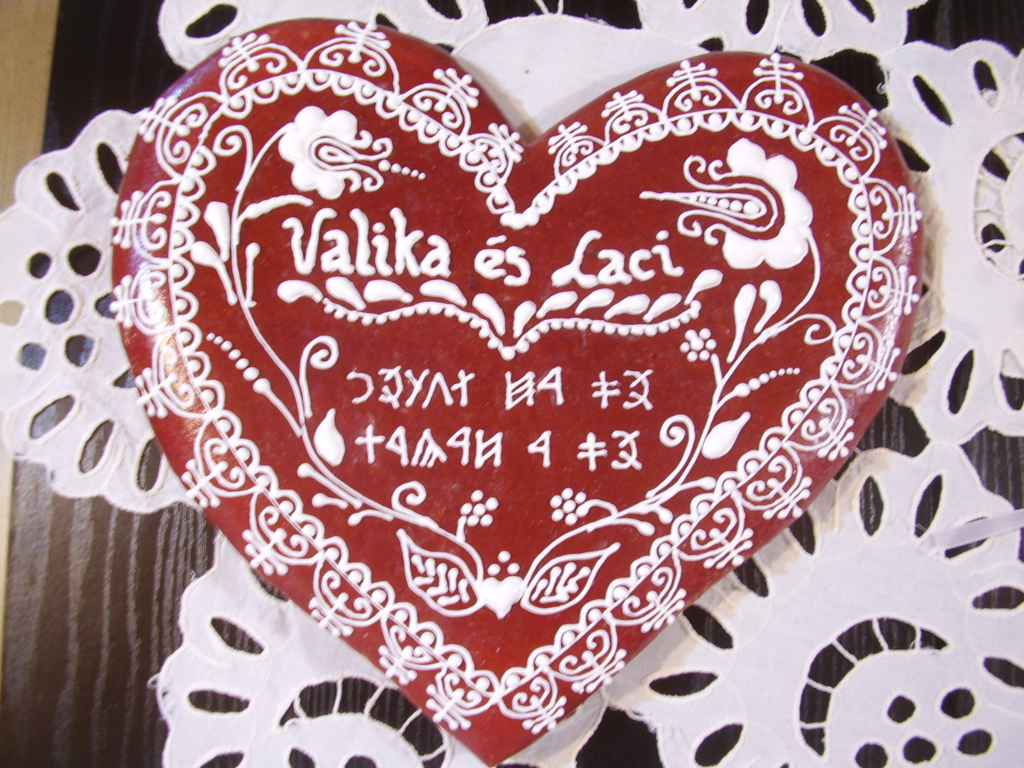 Mézeskalács szívecske rovással, házassági évfordulóra, Óbecséről. Felirata: "Valika és Laci - egy az isten, egy a család". A mézeskalácsot Szerda Elvira készítette.